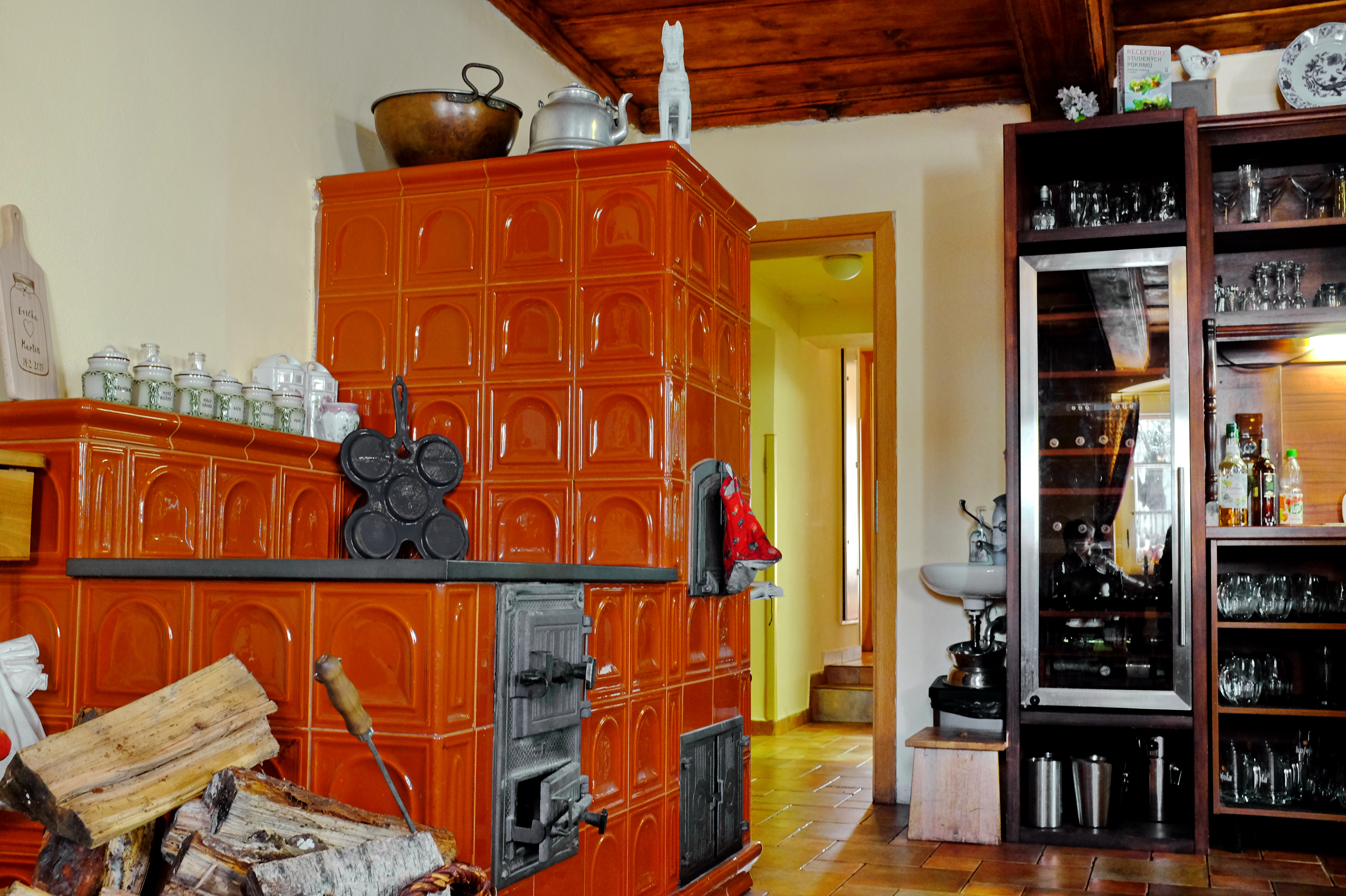 Kostelní Bříza, Zartnerův hostinec čp. 16, okres Sokolov